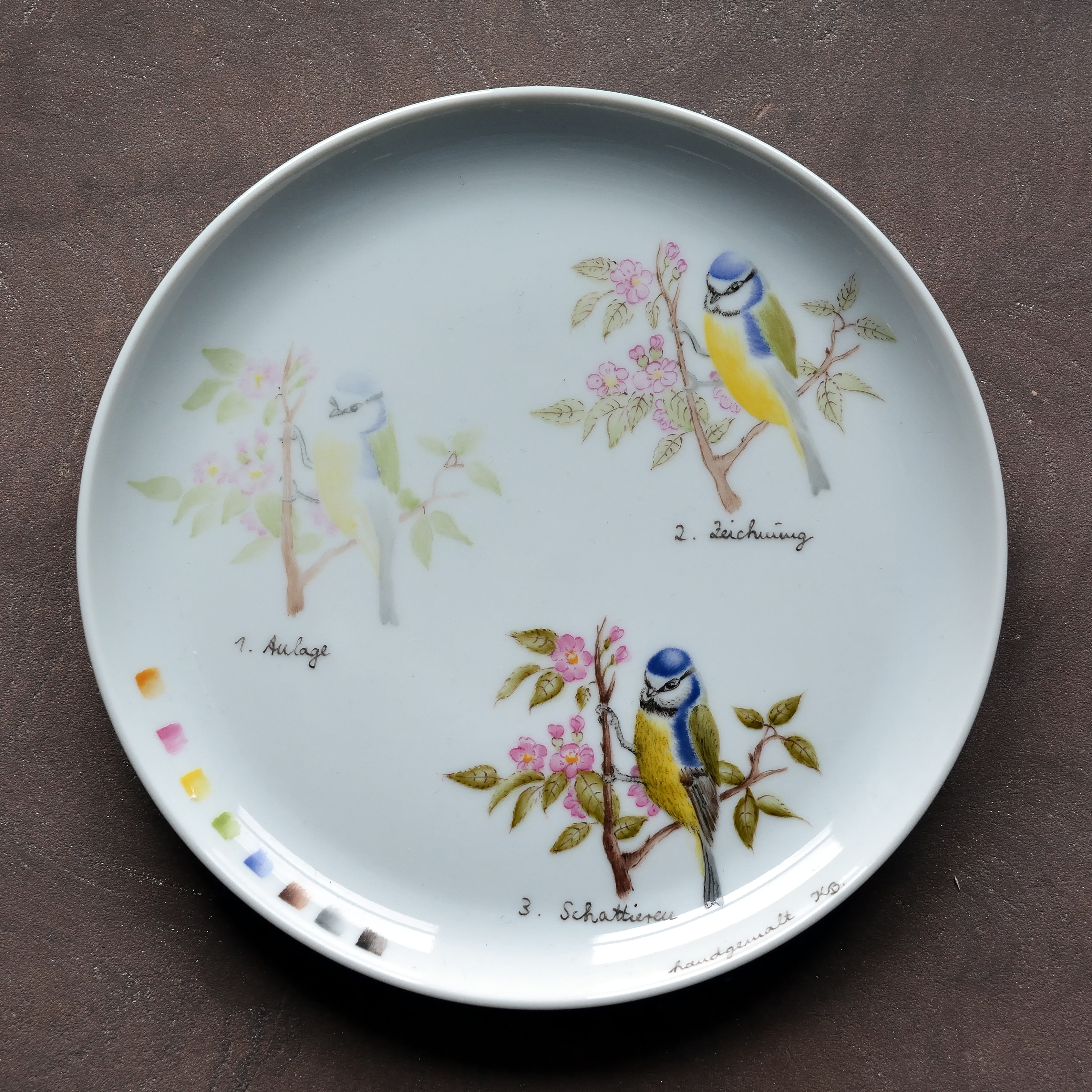 Impressionen vom Porzellanmuseum Schloss Fürstenberg Besucherwerkstatt